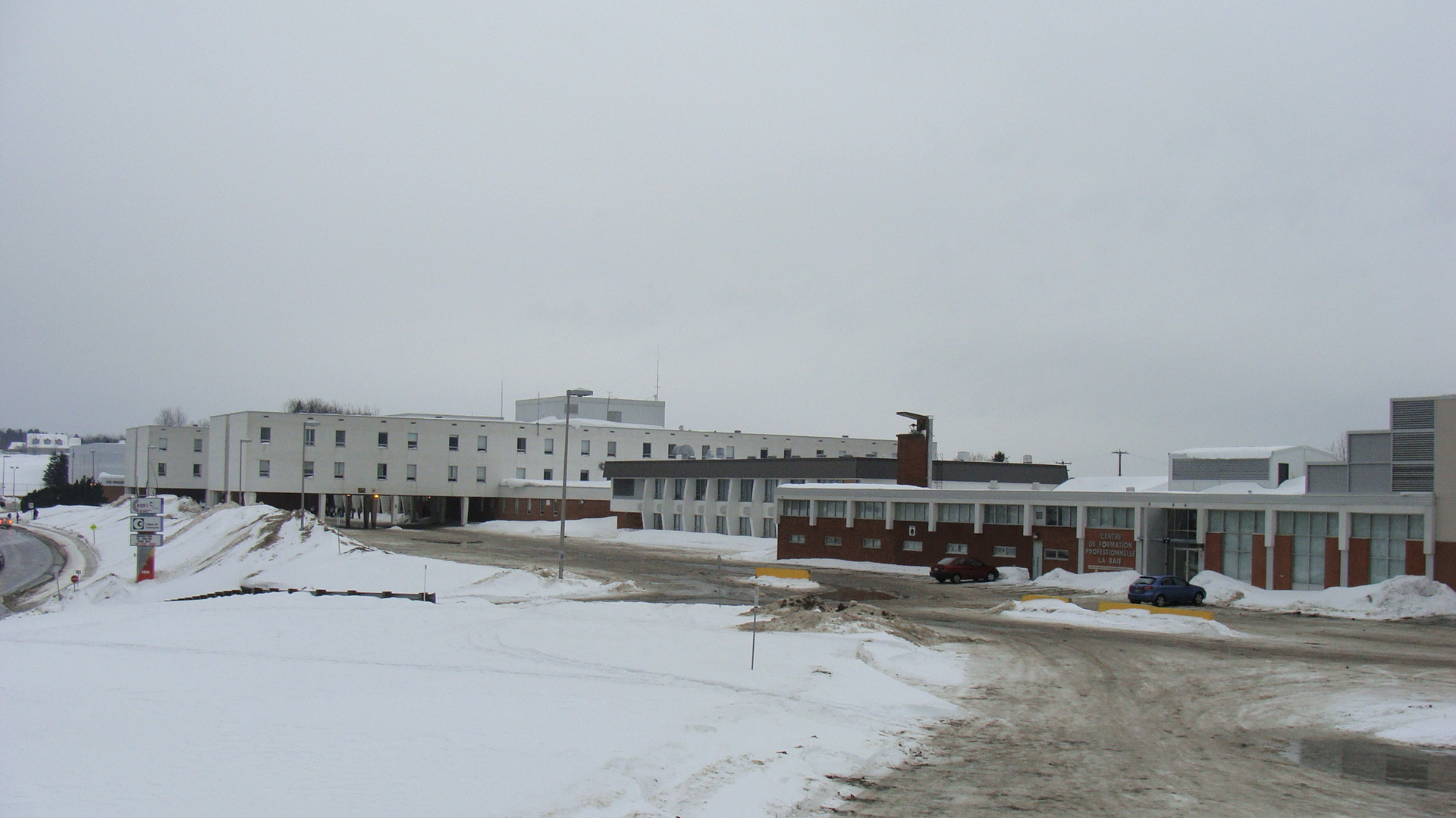 Polyvalente de La Baie, au Saguenay (Québec, Canada).